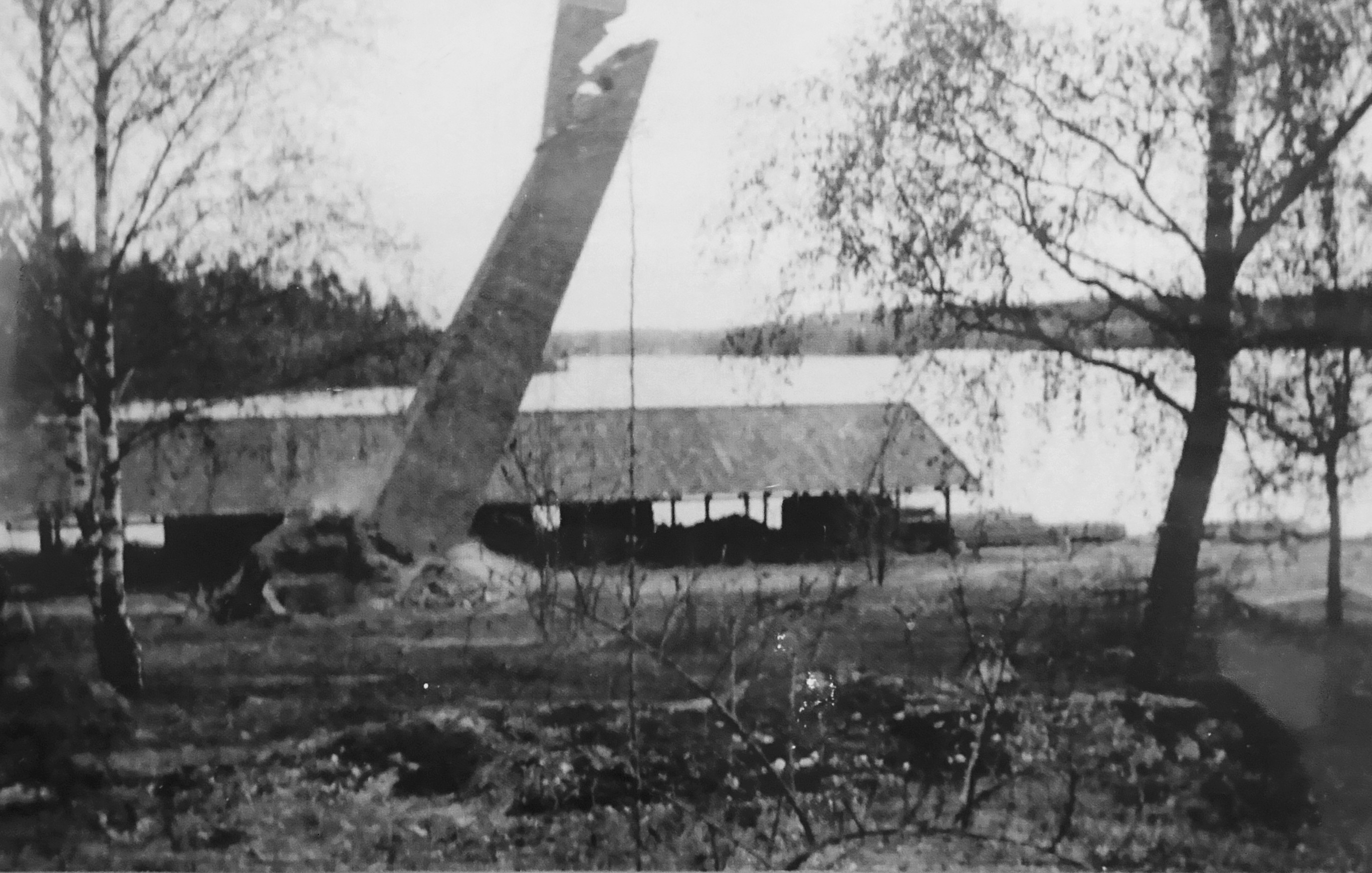 Lerviks tegelbruk, skorstenen sprängs